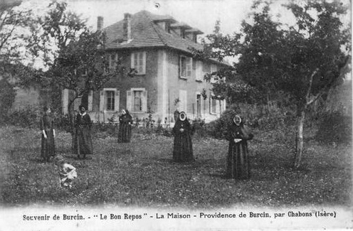 Carte postale ancienne, Bon Repos, Burcin, Isère, Rhône-Alpes, France.